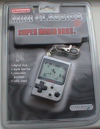 El juego Super Mario Bros. para la consola portatil Nintendo Mini Classics de la marca Stadlbauer (marca licenciada oficialmente por Nintendo).